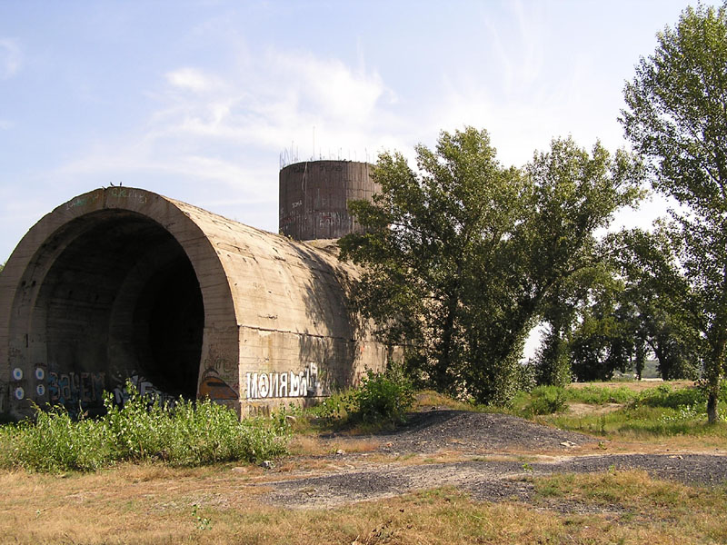 Недостроенный железнодорожный тоннель на Оболони